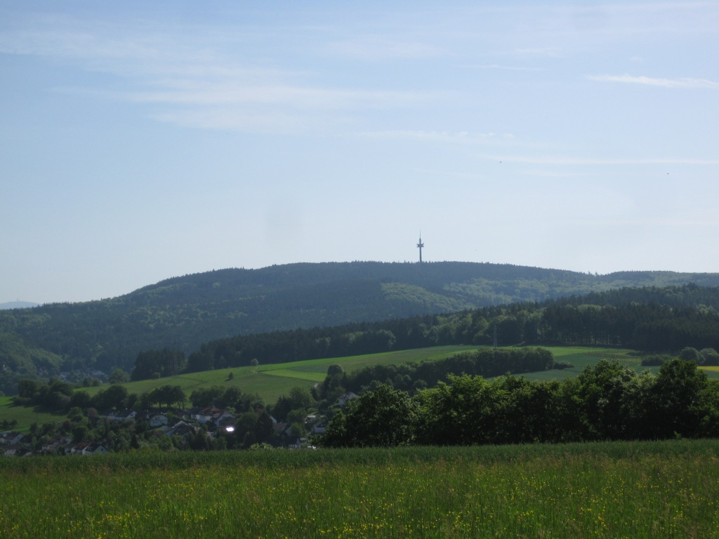 Hohe Wurzel aus Westen, vorne Bärstadt